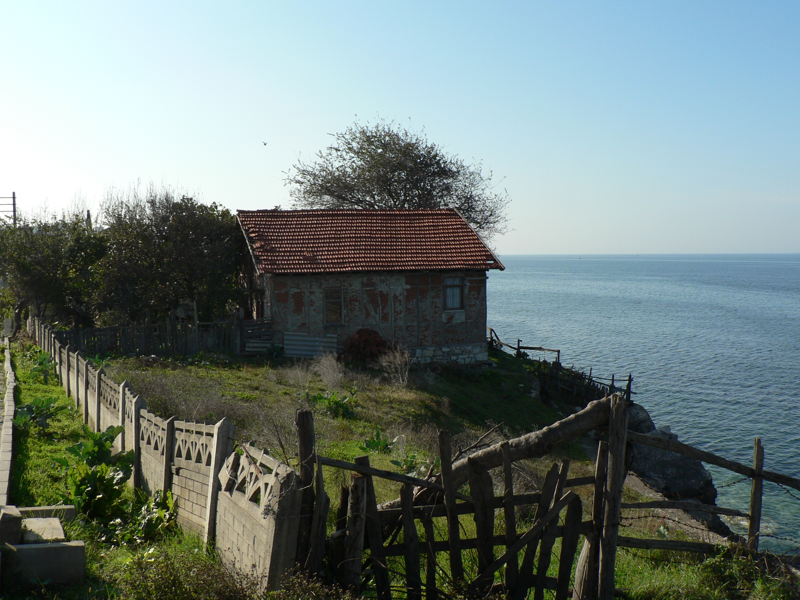 Akçakoca Eski Ev